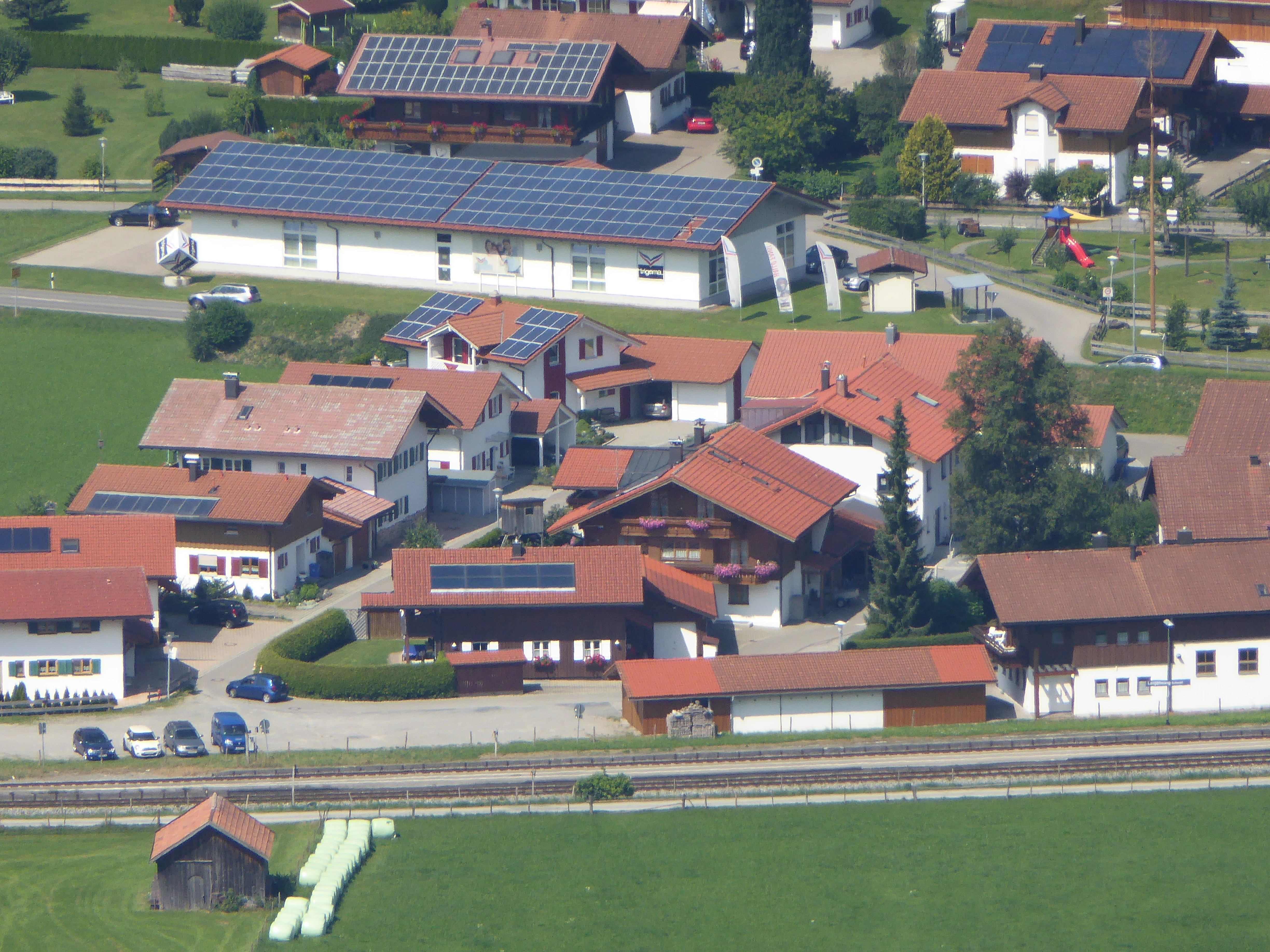 Erneuerbare Energien in Oberstdorf Photovoltaik-Solaranlagen